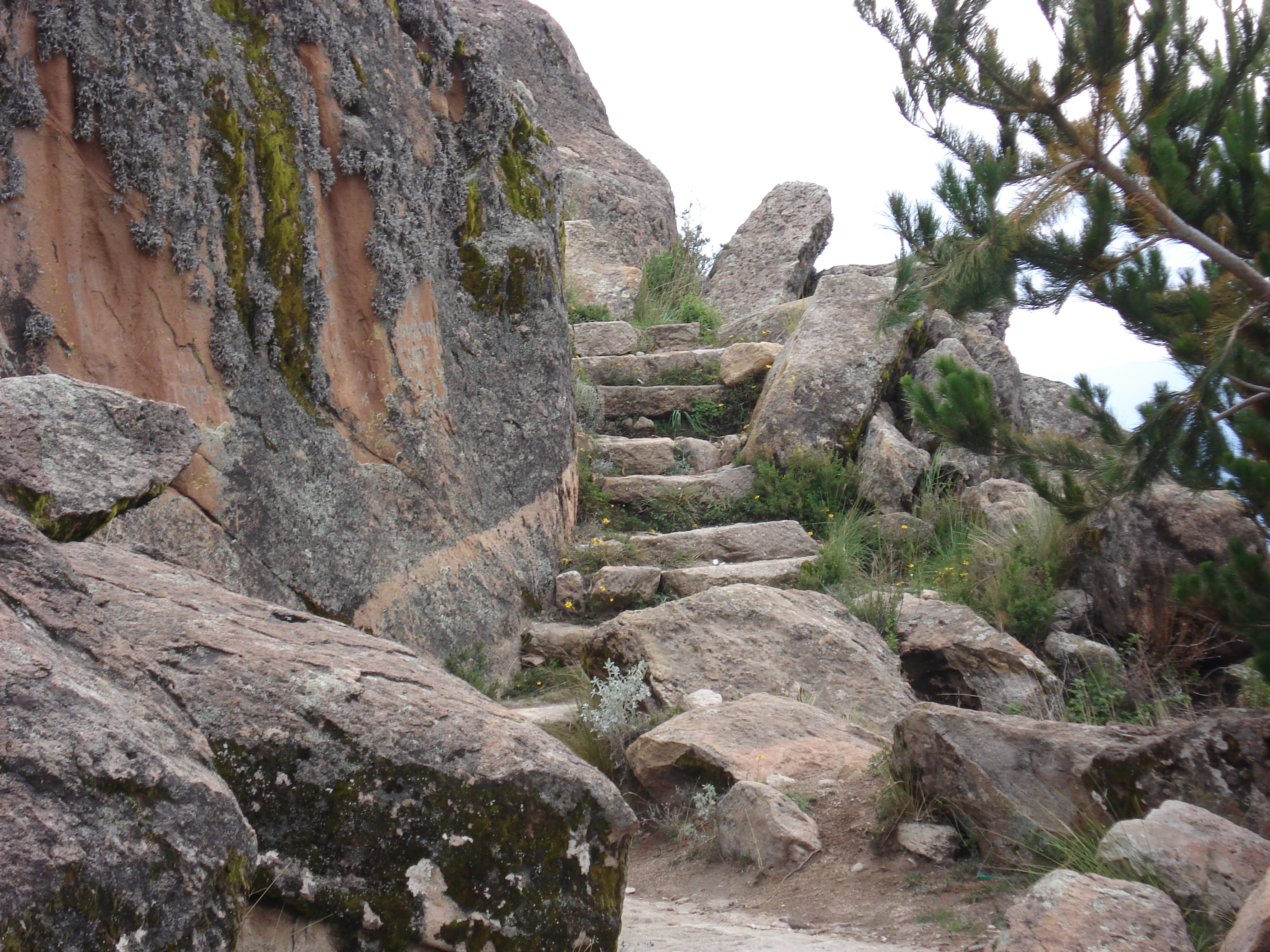 Ruinas Incaicas de Copacabana This medium shows the protected monument with the number L/00-293 in Bolivia.